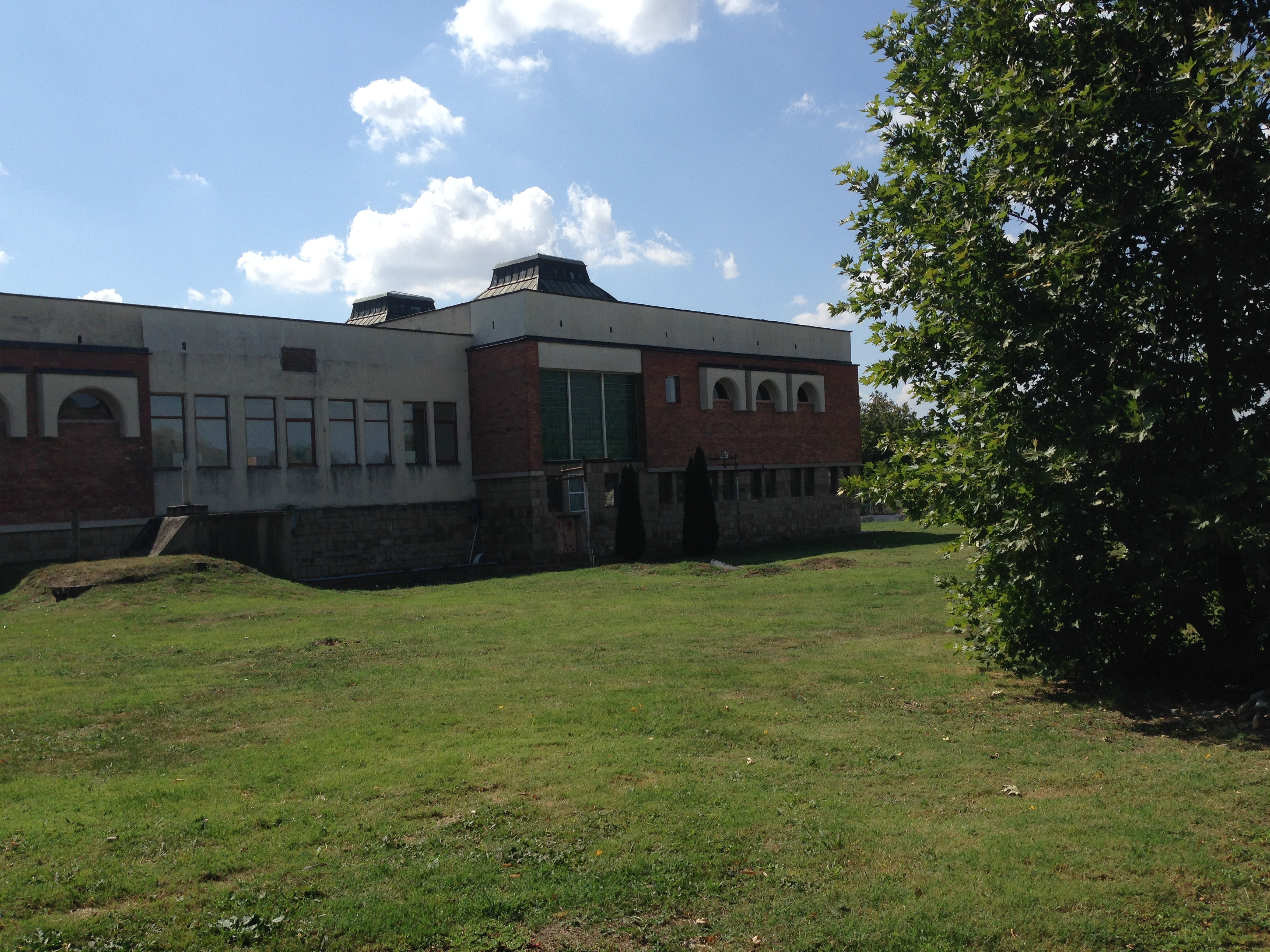 Сграда на минералната баня в с. Обединение, лятото на 2017 г.